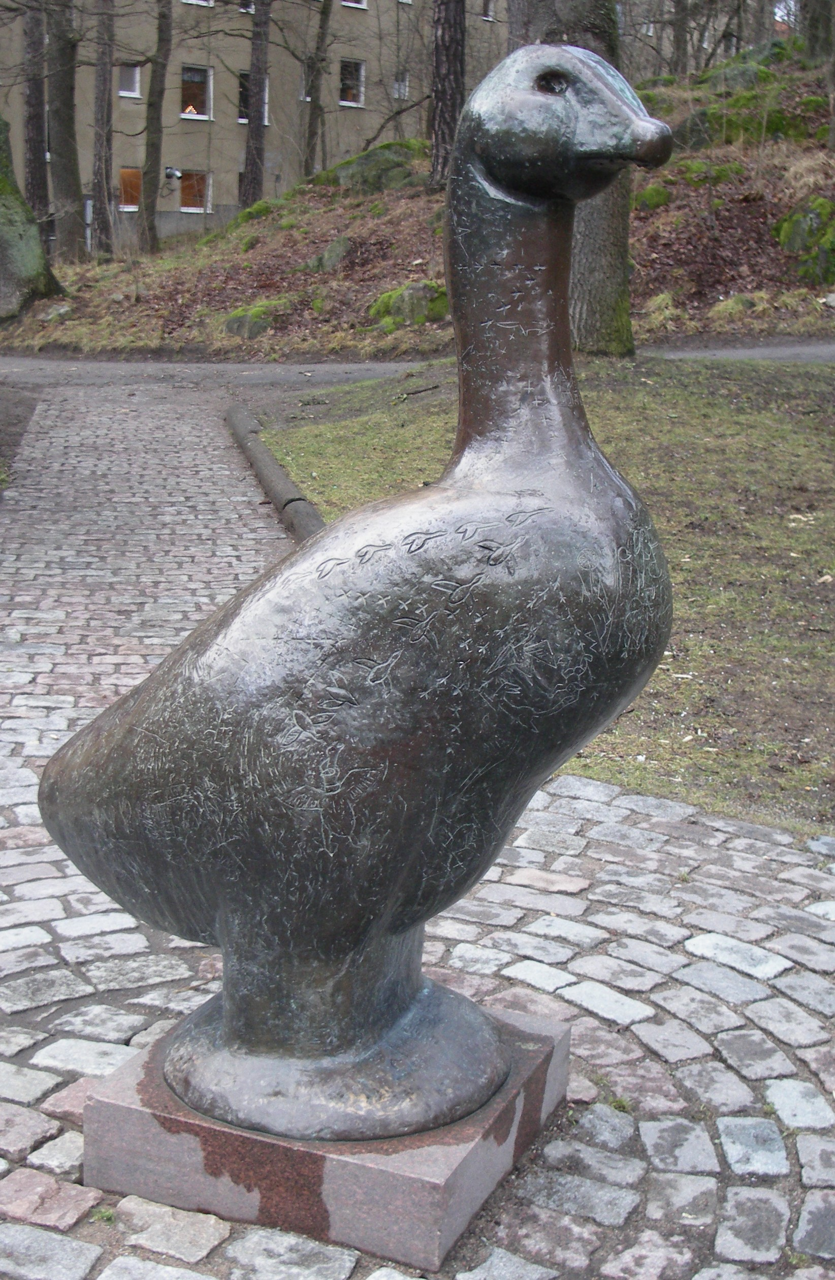 Edvin Öhrströms Den store hvide (1953) brons. Finns i Västertorp, i lekparken NÖ om centrum, samt i Neglingeparken, Saltsjöbaden i Nacka. Nils Holgerssons så småningom goda vän gåsen. Skulpturen är full med symboler som Öhrström hämtat från Selma Lagerlöfs Nils Holgerssons underbara resa genom Sverige. Edvin Ohrstrom´s The big white one the goose in the Nobel Laureate Selma Lagerlöf´s Nils Holgerson´s wonderful trips around Sweden. The sculpture is covered by symbols from this book.